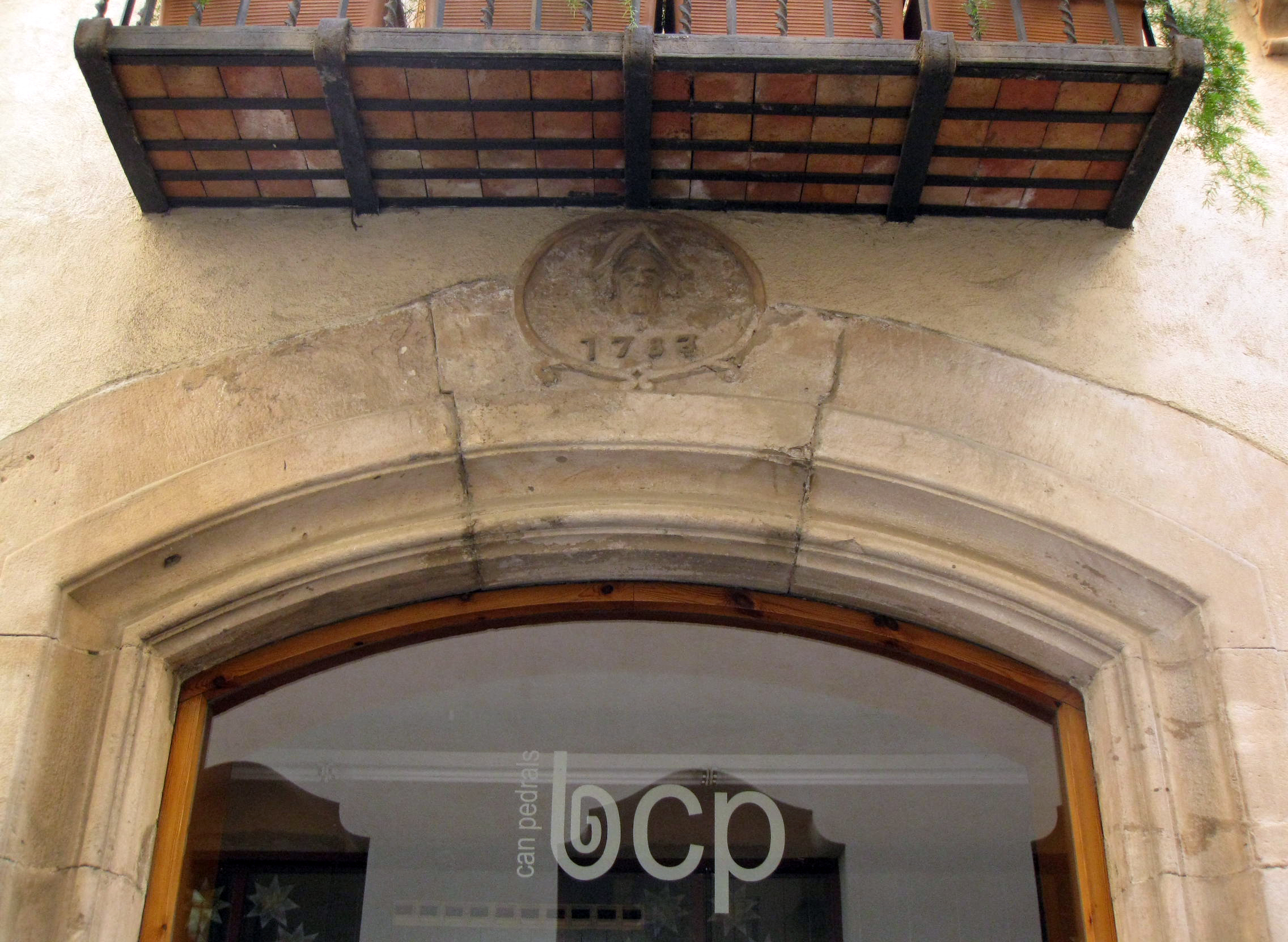 Can Pedrals (Granollers) Object location41° 36′ 32.3″ N, 2° 17′ 17.24″ E